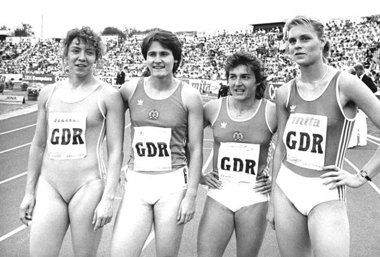 ADN-ZB/ Koard/5.8.89/ Großbritannien: Leichtathletik-Europapokalfinal (A-Gruppe) in Gateshead/ Die DDR-Sprintstaffel über 4x 100m siegte in der Weltjahresbestzeit von 41,87 s. V.l. Sabine Günther, Kerstin Behrendt, Silke Möller und Katrin Krabbe